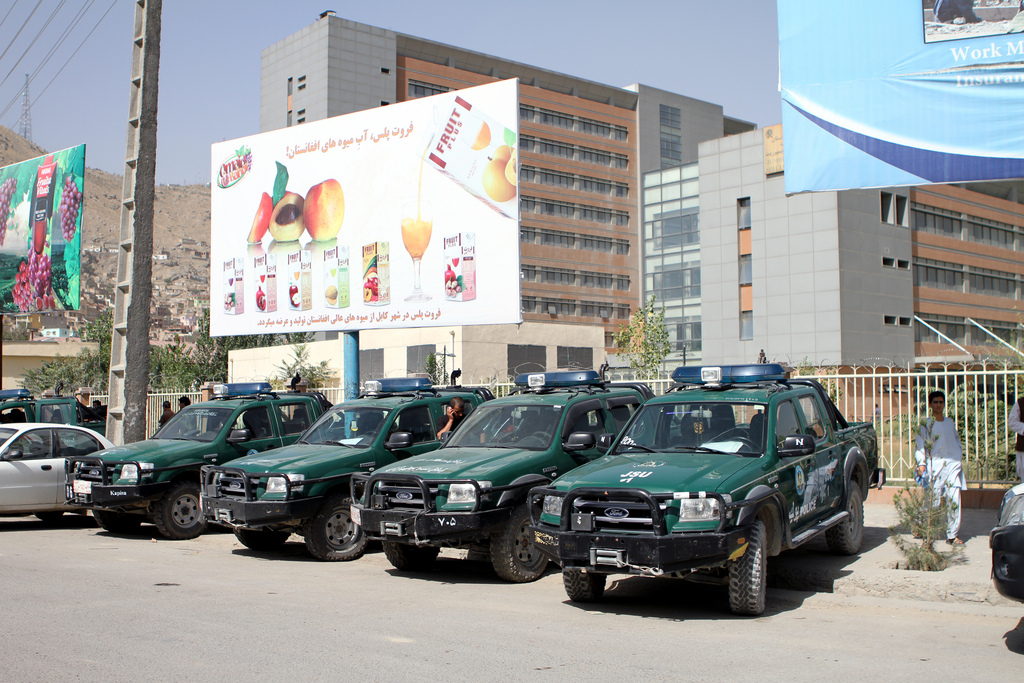 Police cars